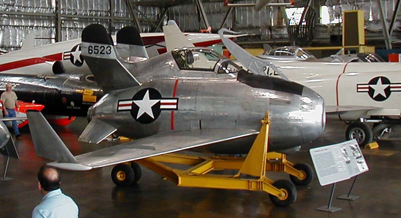 McDonnell XF-85 Goblin on display at the USAF Museum at Wright-Patterson AFB in Dayton, OH.